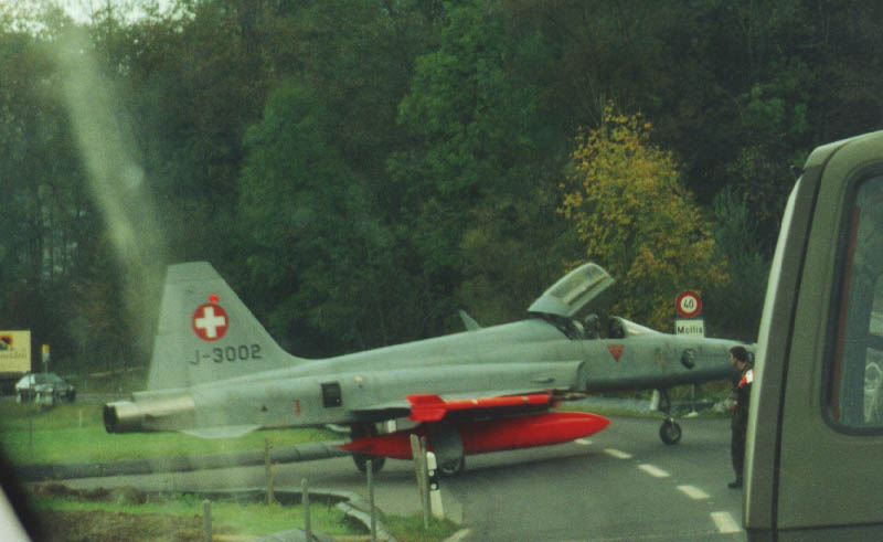 F-5E der schweizer luftwaffe (1999)